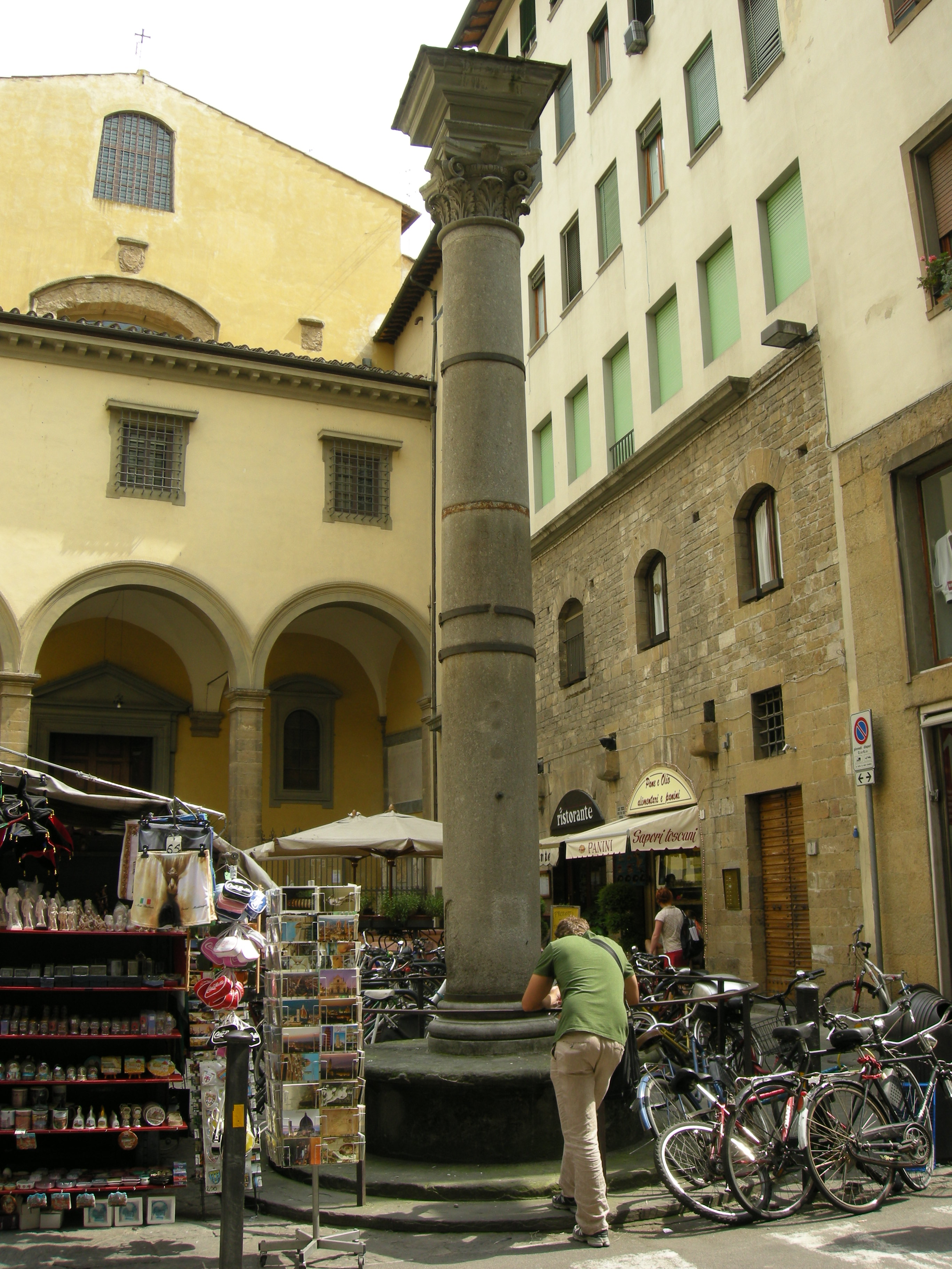 Colonna di santa felicita